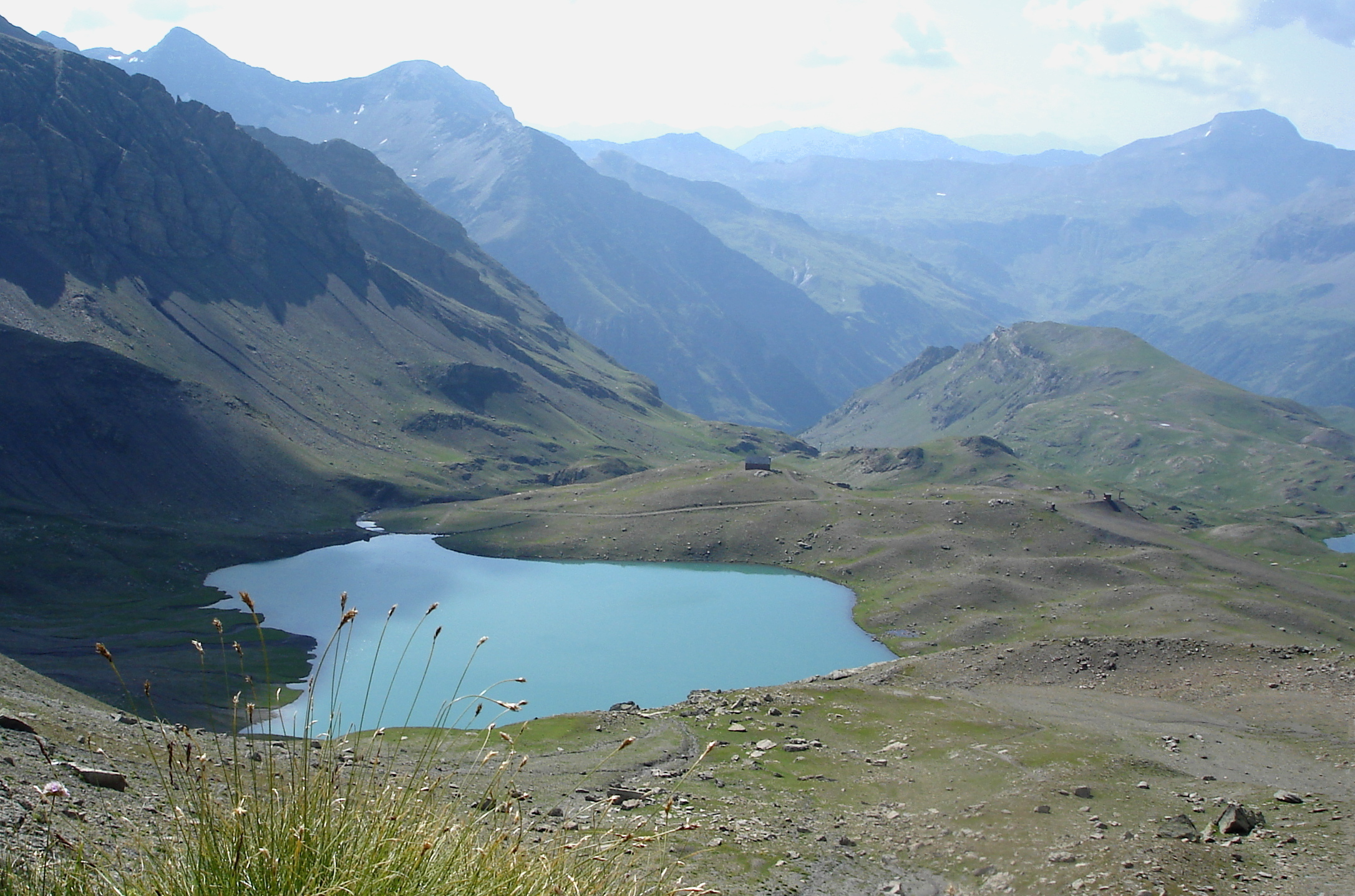 Le lac des Estaris ( 2550m), est le plus grand lac de la commune, classé réserve naturelle..